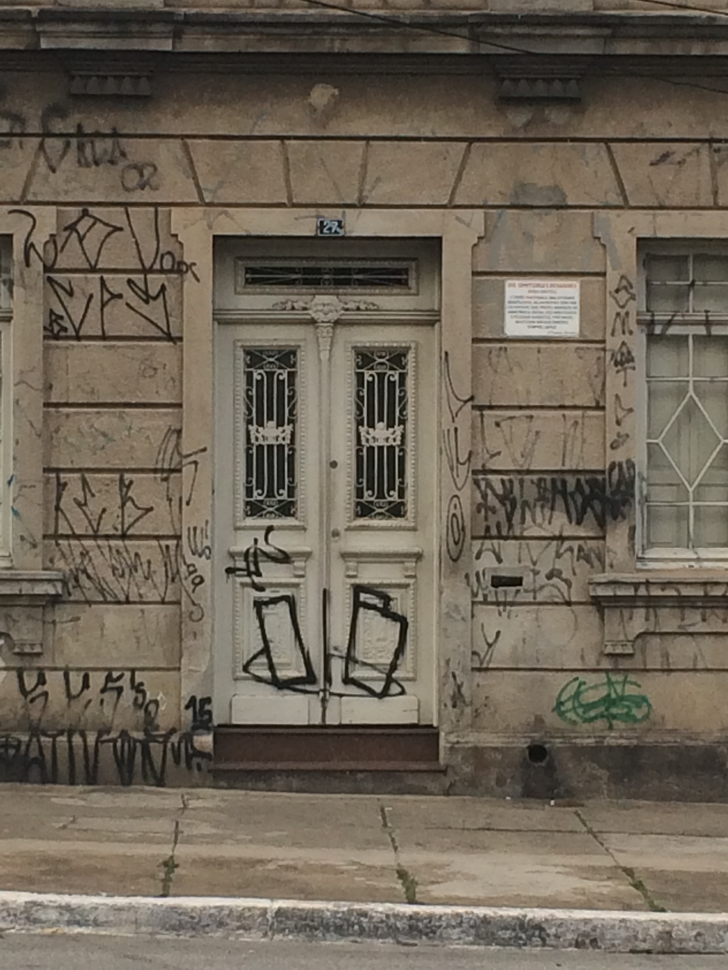 O edifício da Sociedade Beneficente União Fraterna está localizado na esquina das ruas Guaicurus e Faustolo, no bairro Água Branca, Zona Oeste de São Paulo.